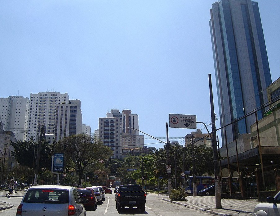 Foto da Avenida Cruzeiro do Sul